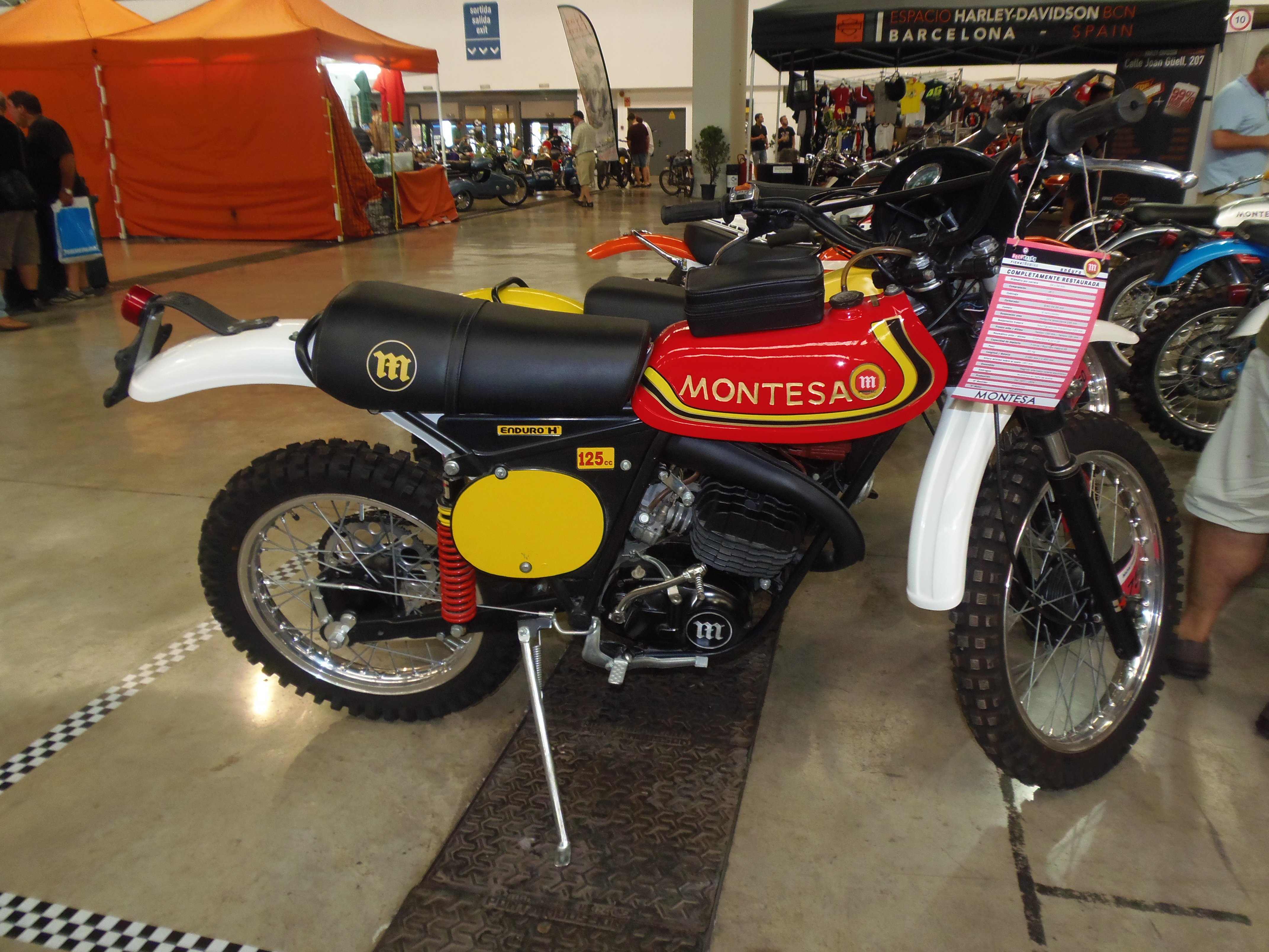 Montesa Enduro H 125, 1977